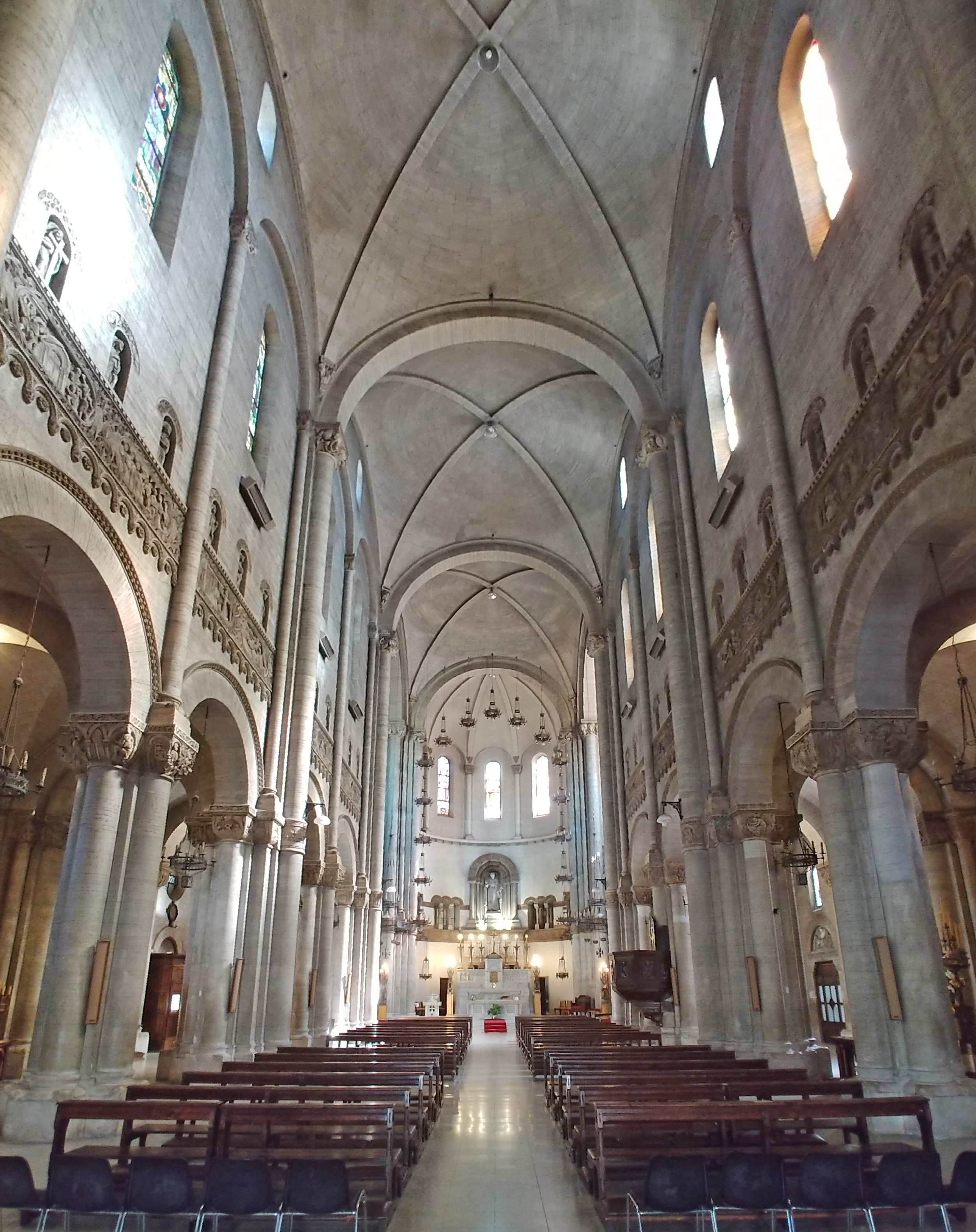 Interno.